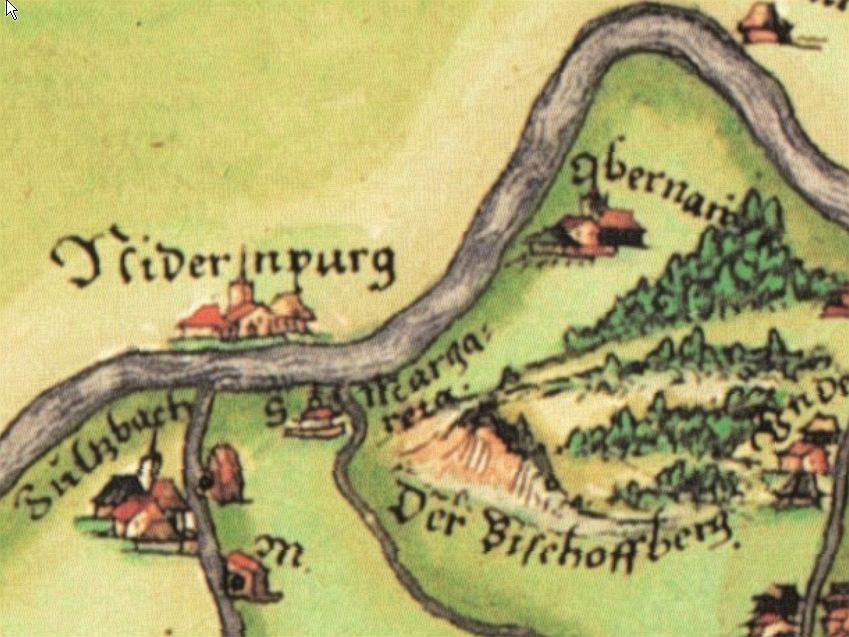 St. Margaretha in campis (auf den Feldern), Ruchelnheim Mutterpfarrei von Sulzbach und Obernau auf der Spessartkarte von 1594